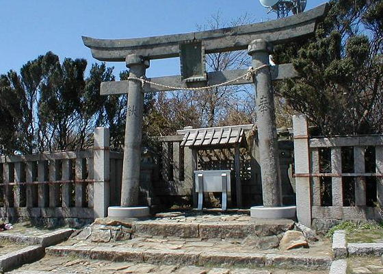 弥彦神社の奥社、御神廟。